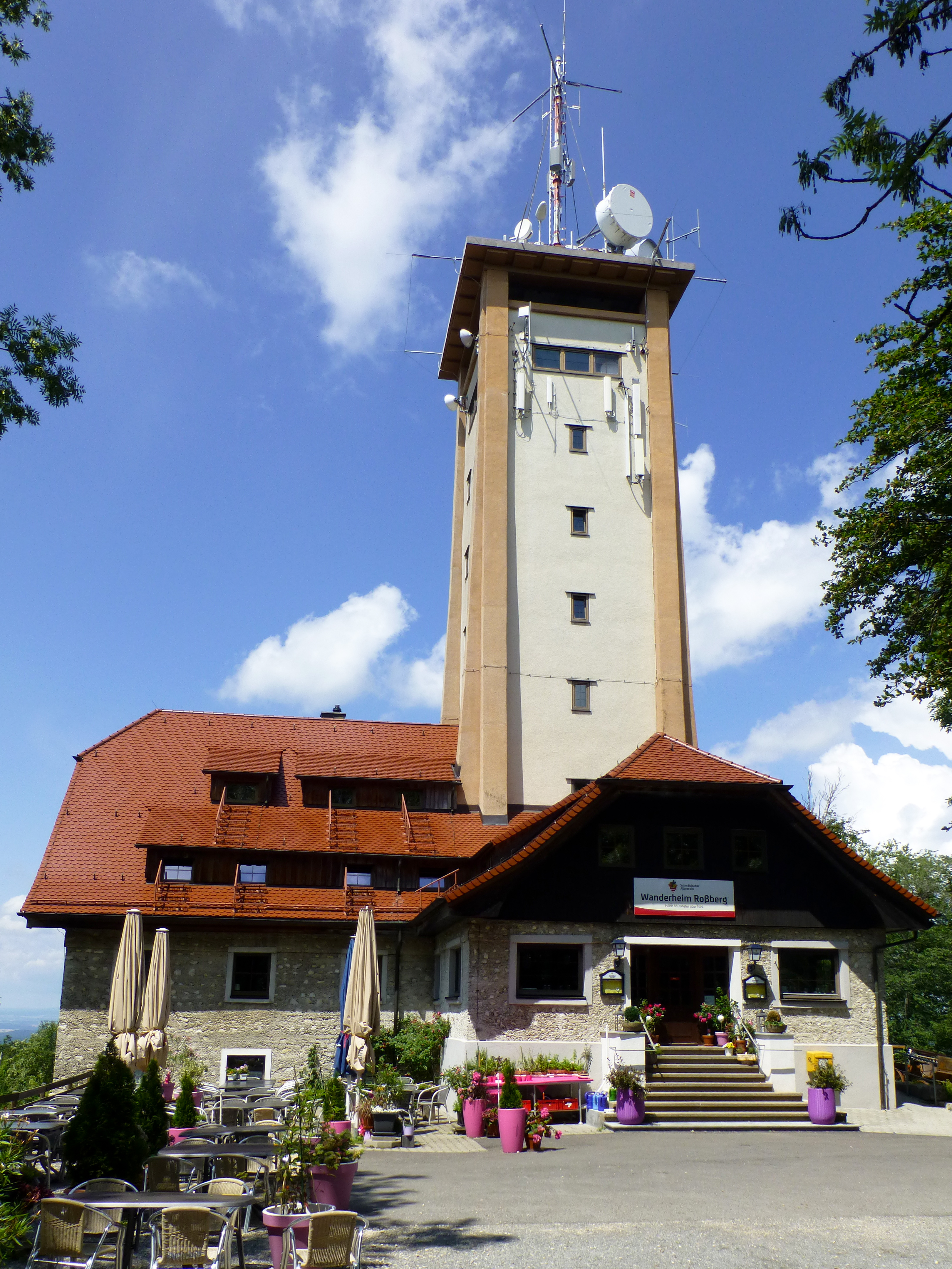 Roßbergturm mit angebautem Wanderheim; Ansicht der Ostseite